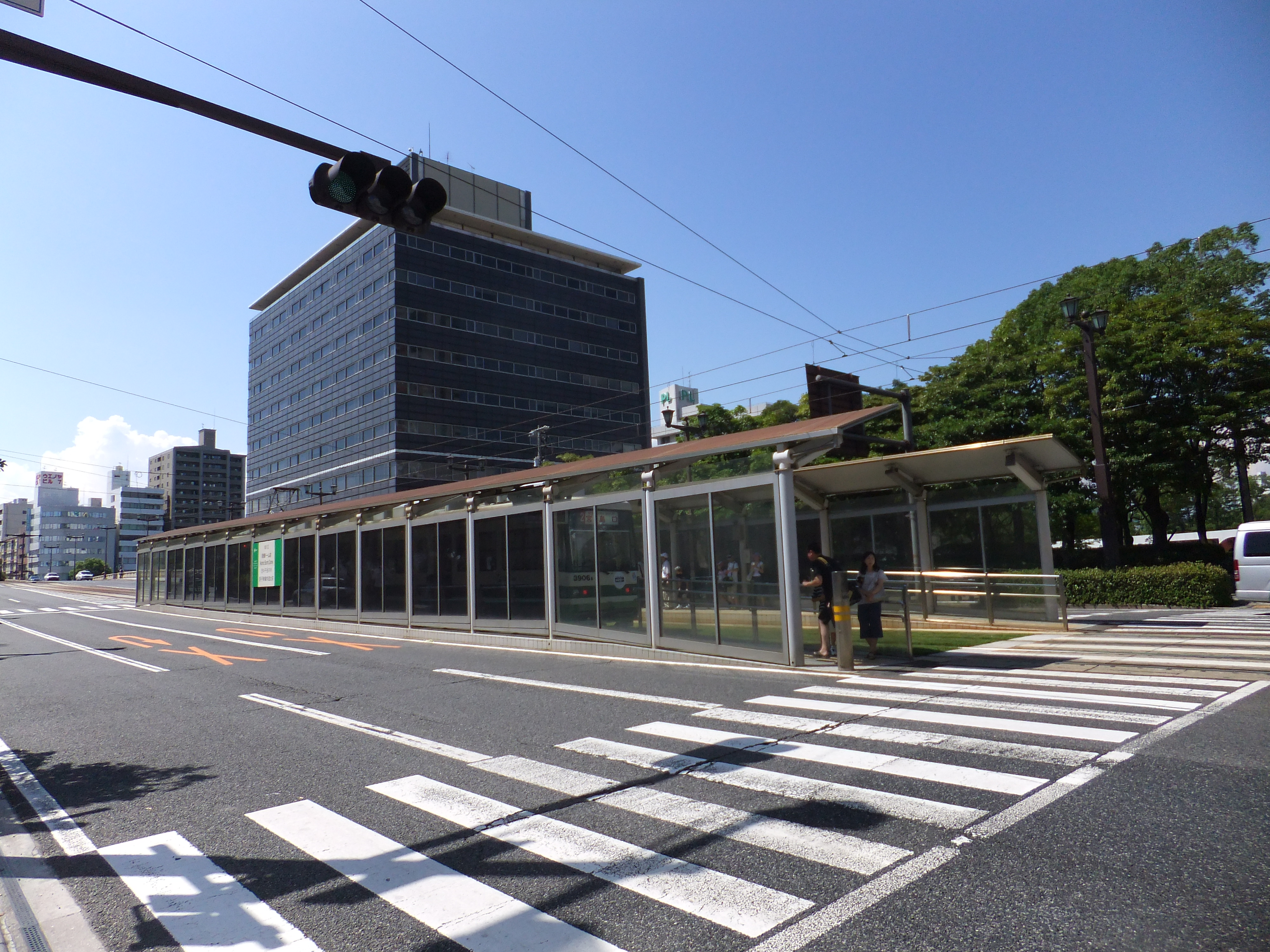 広島電鉄 原爆ドーム前駅